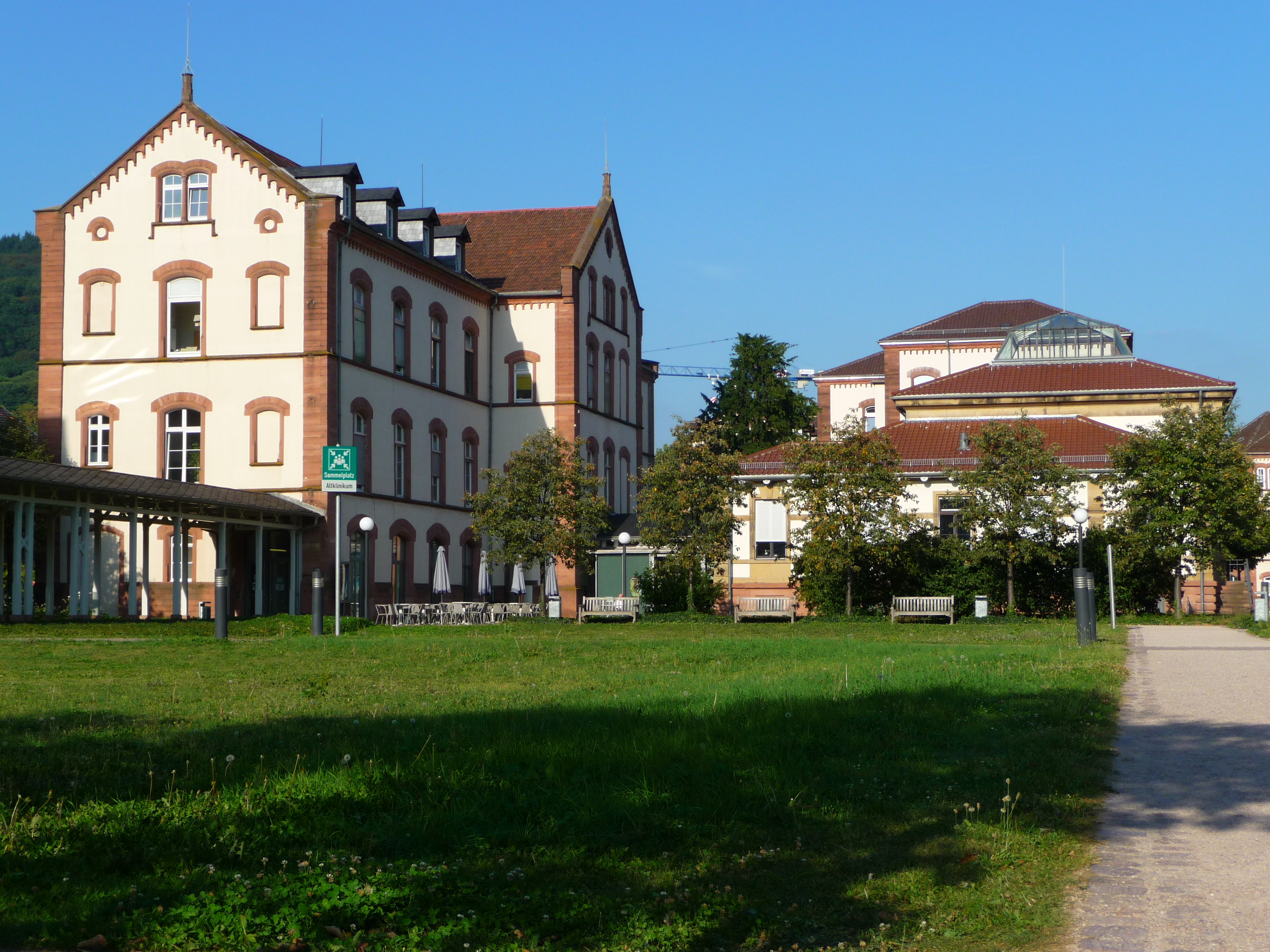 Haupteingang zur "Sammlung Prinzhorn" im Bereich des Altklinikums der Universitätsklinik Heidelberg im Stadtteil Bergheim in Heidelberg. Benannt ist die Sammlung nach dem Kunsthistoriker und Arzt Hans Prinzhorn, der in den Jahren 1919 bis 1921 als Assistent der Heidelberger Psychiatrischen Universitätsklinik die psychiatrischen Anstalten des In- und Auslands um bildnerische Werke von Patienten bat. Die Sammlung umfasst ca. 5.000 Werke.